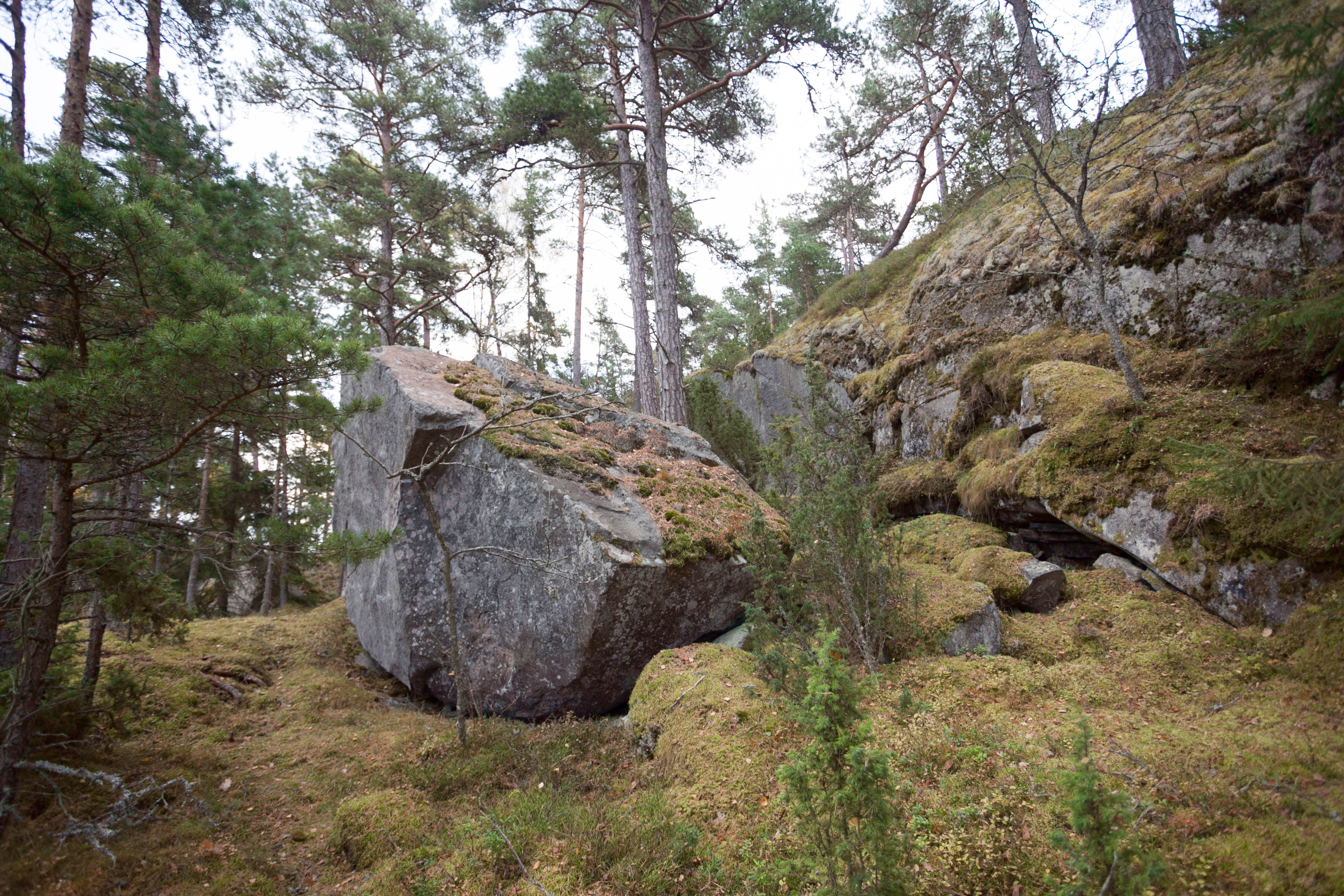 Siirtolohkare Tammisaaren kansallispuistossa